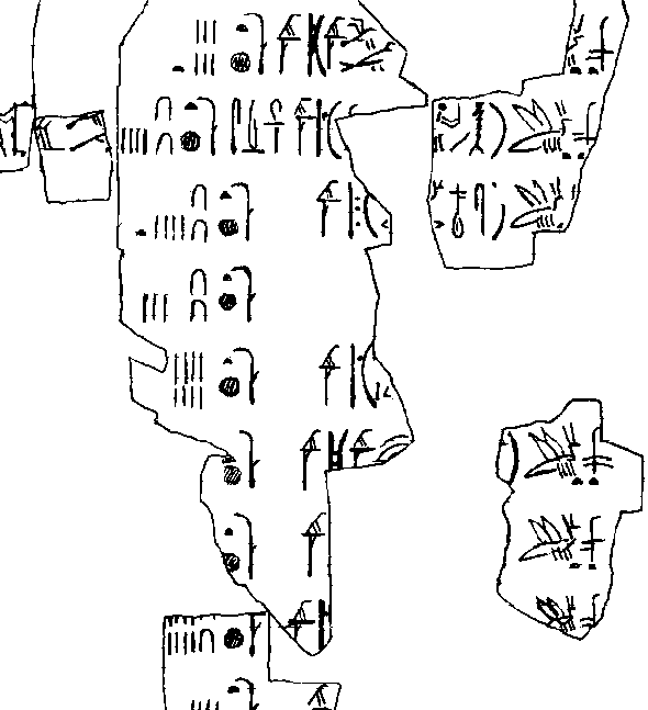 Turin Canon 3. Dyn.